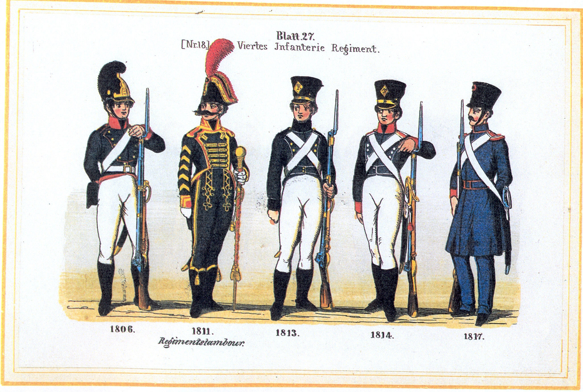 Blatt 27: 4. Infanterie-Regiment